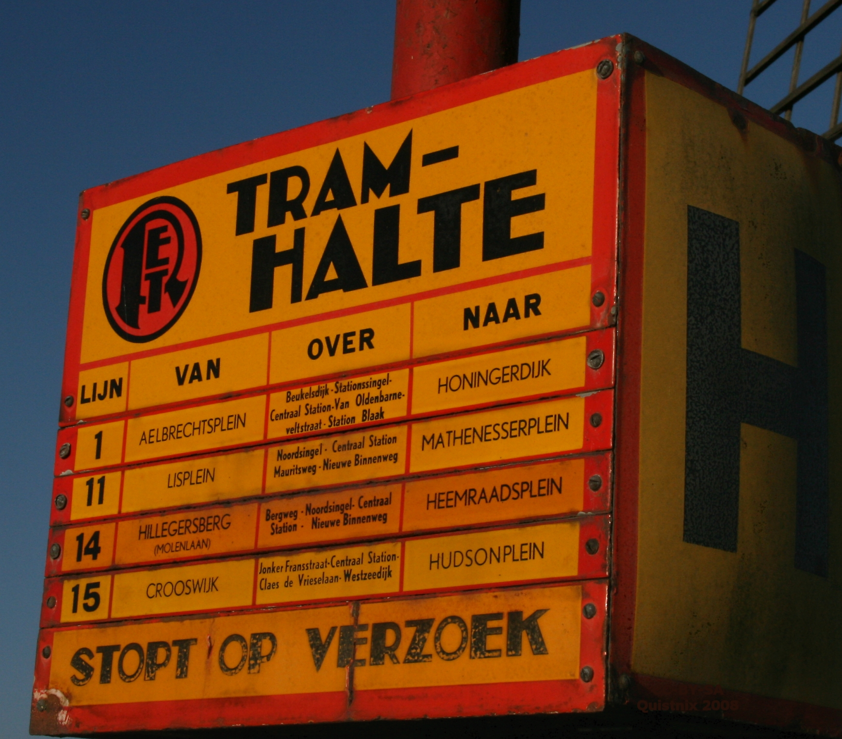 RET tramhaltebord oud model, gefotografeerd bij de Oostmolen in Mijnsheerenland.